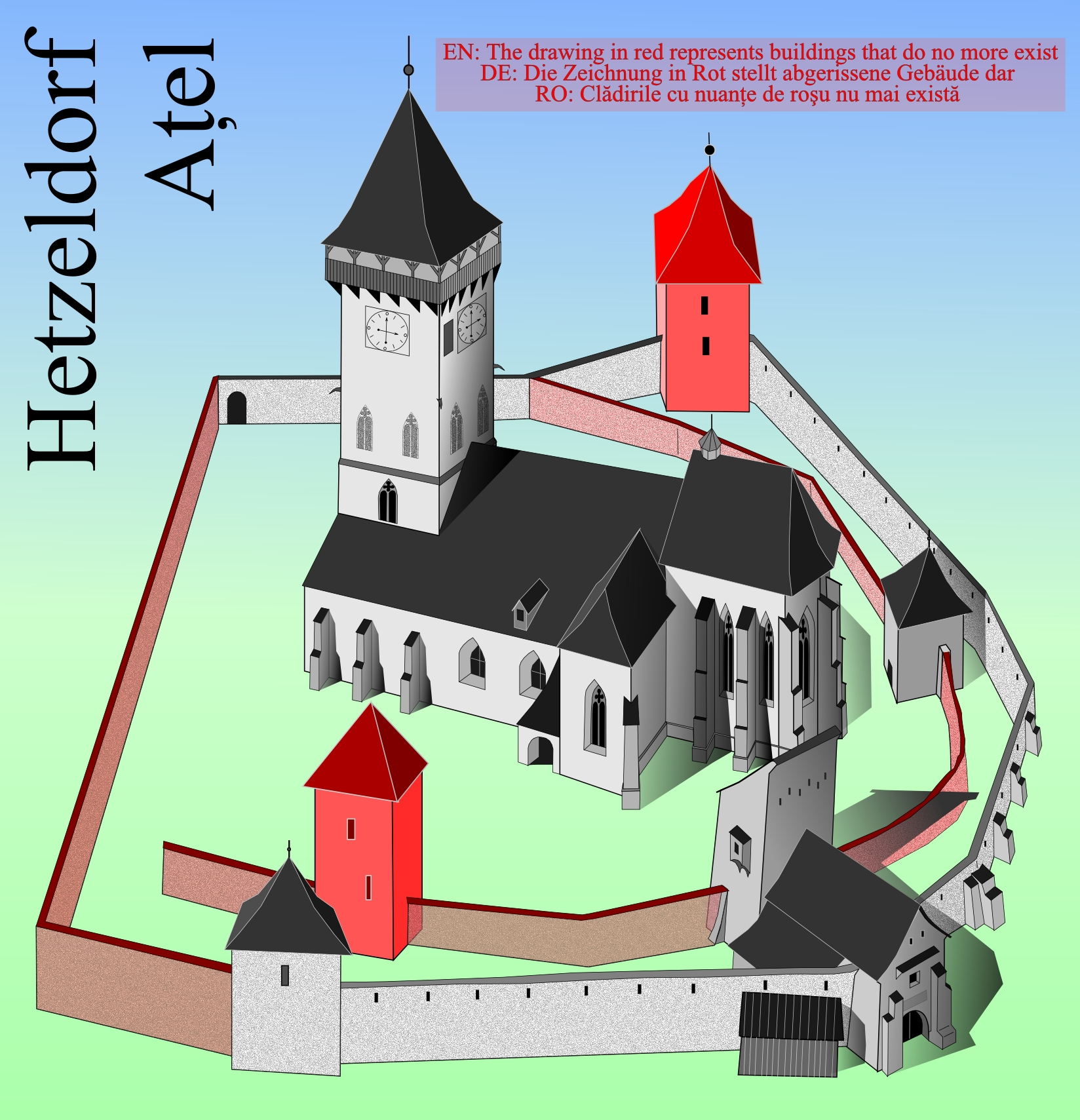 Biserica fortificata din Atel.